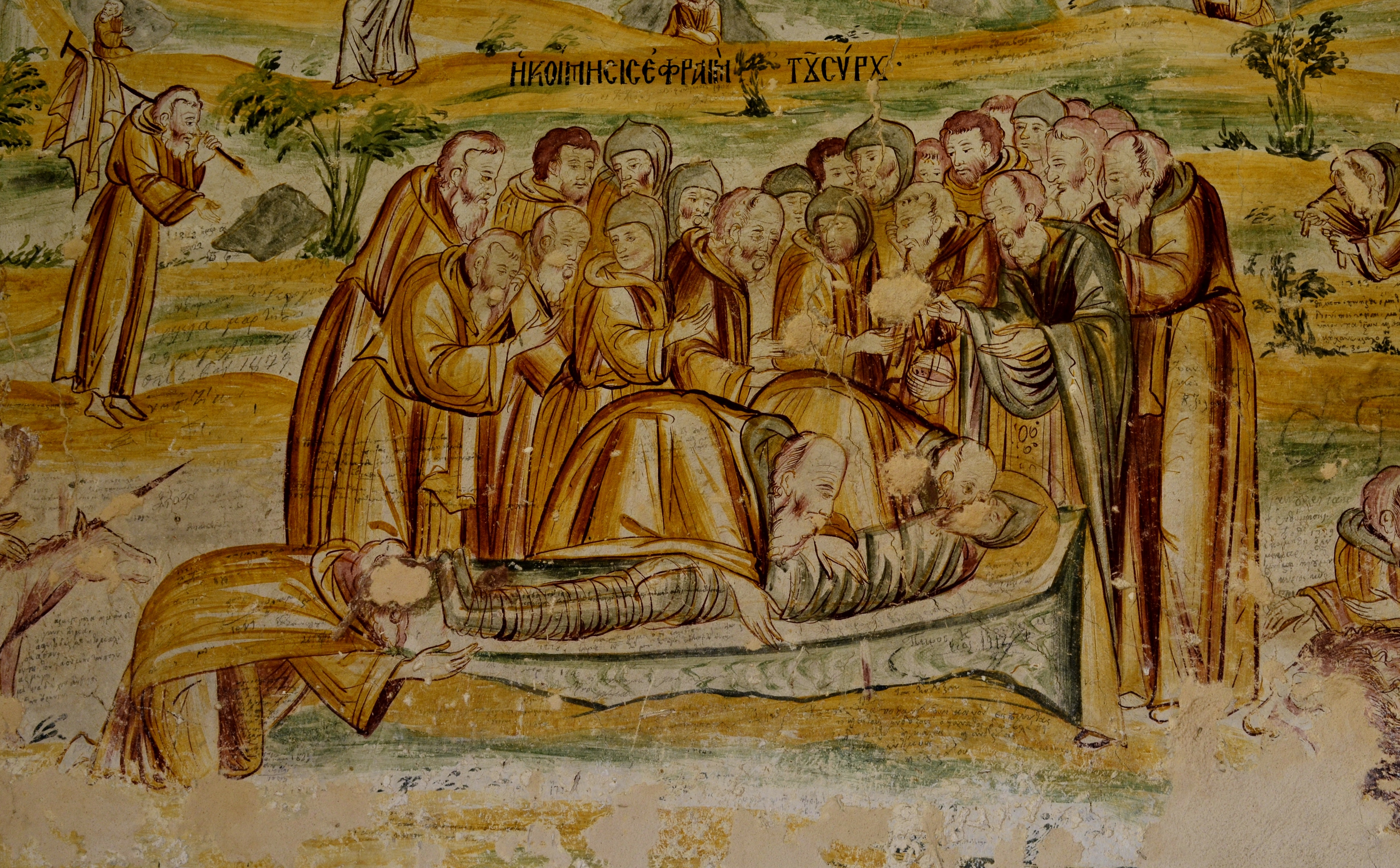 Μονή κοίμησης της θεοτόκου Ρεντίνας Η κοίμηση του Εφραίμ του Σύρου .